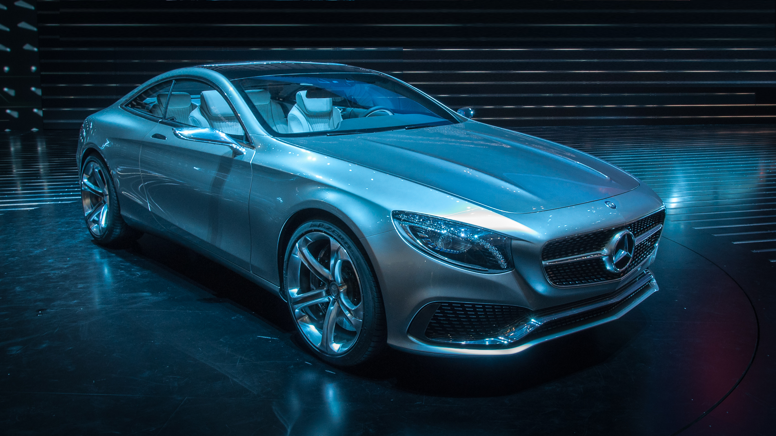 Mercedes-Benz Concept S-Klasse Coupé